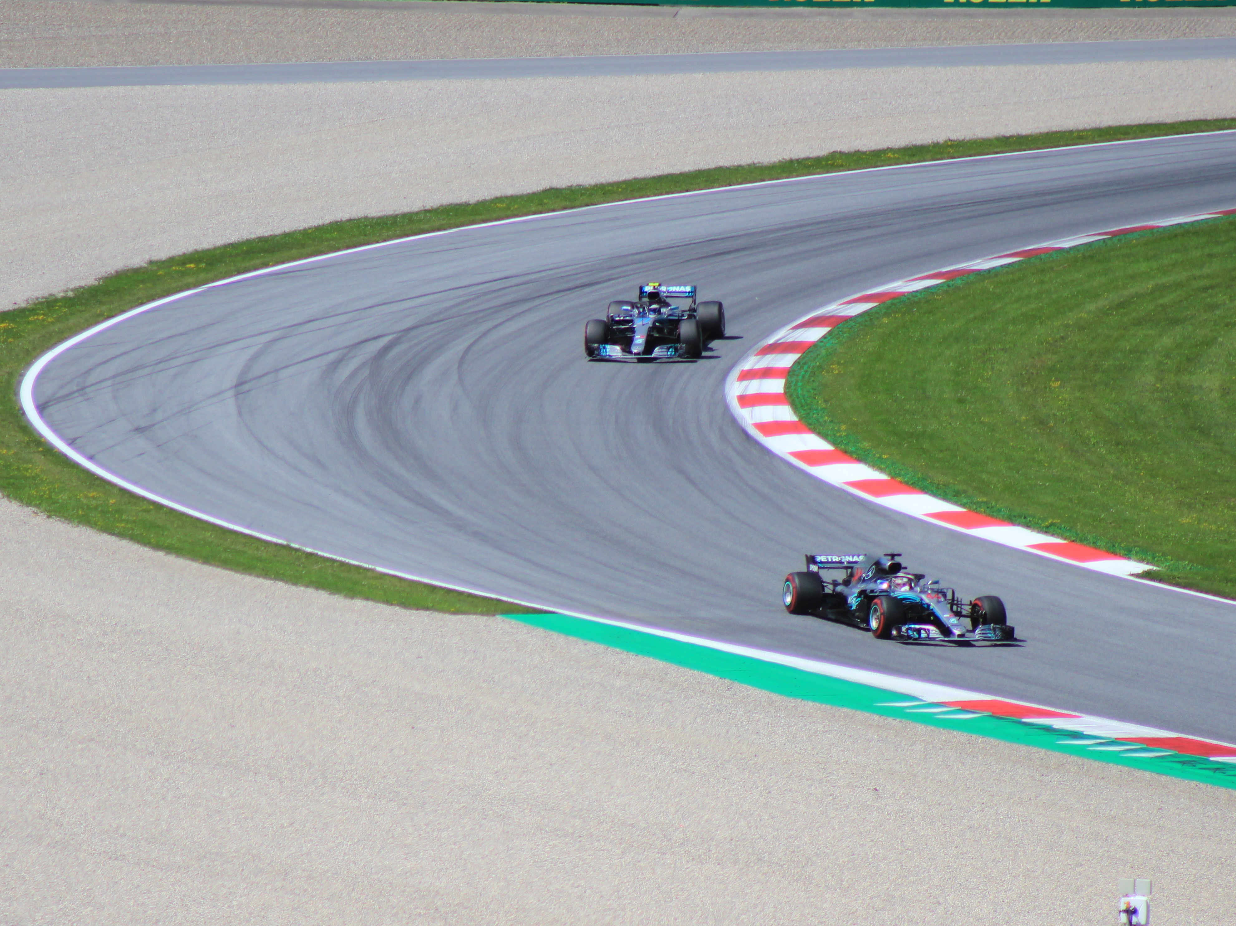 Szenen vom Rennen (Hamilton vor Bottas in Führung)